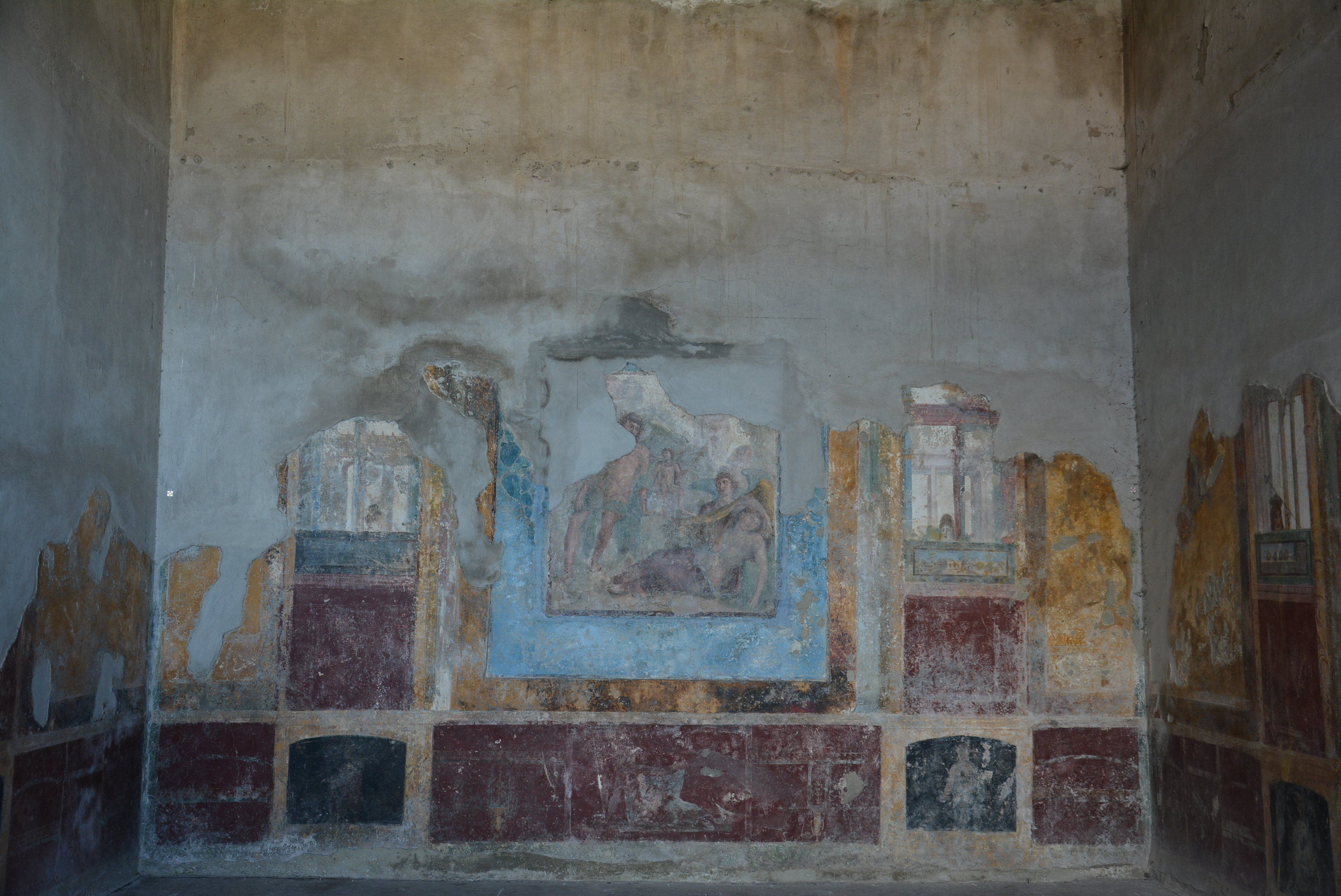 Villa Arianna, Stabia - MIBAC This is a photo of a monument which is part of cultural heritage of Italy.